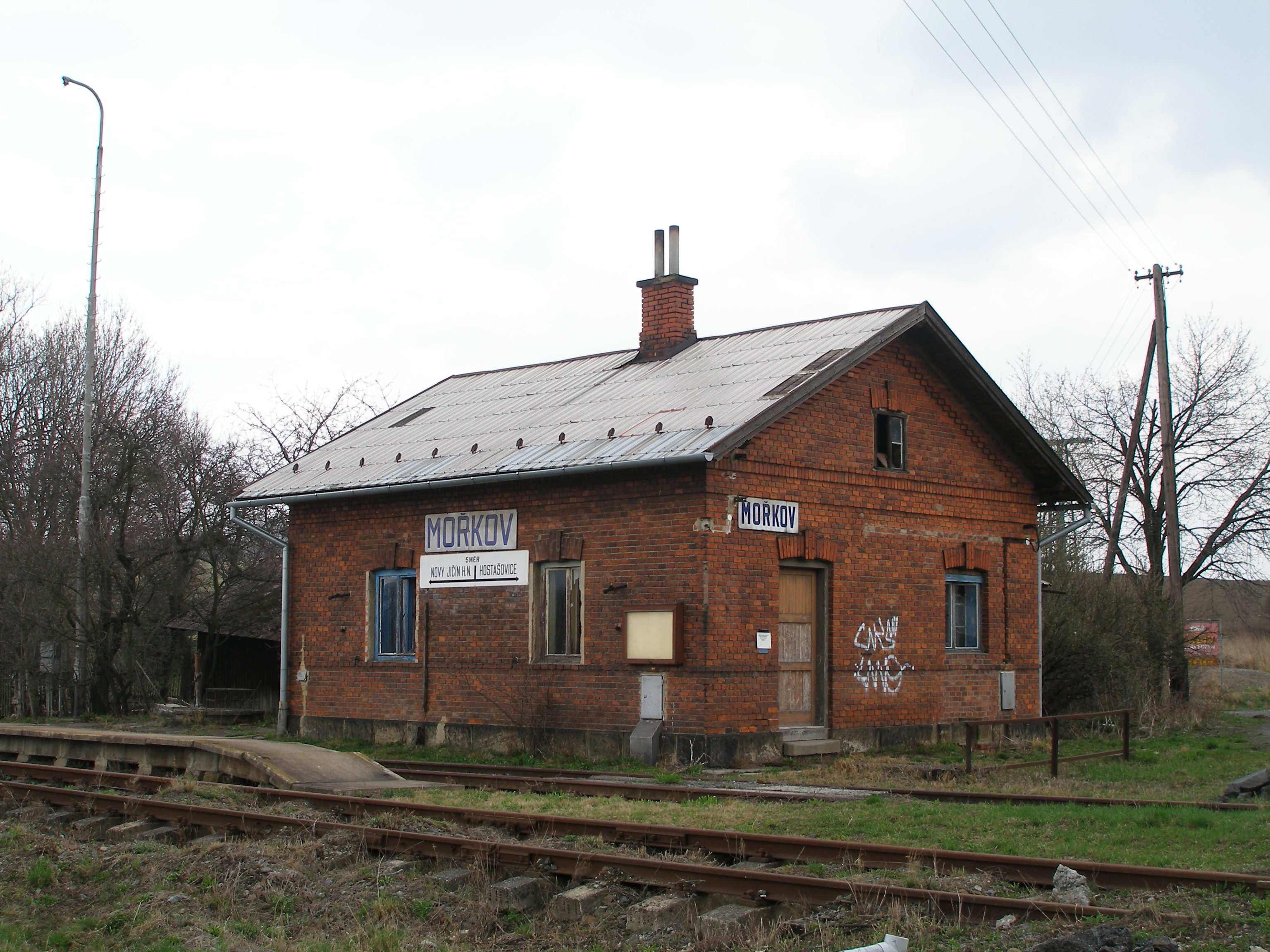 Zrušená železniční zastávka Mořkov - pohled z jihozápadu.